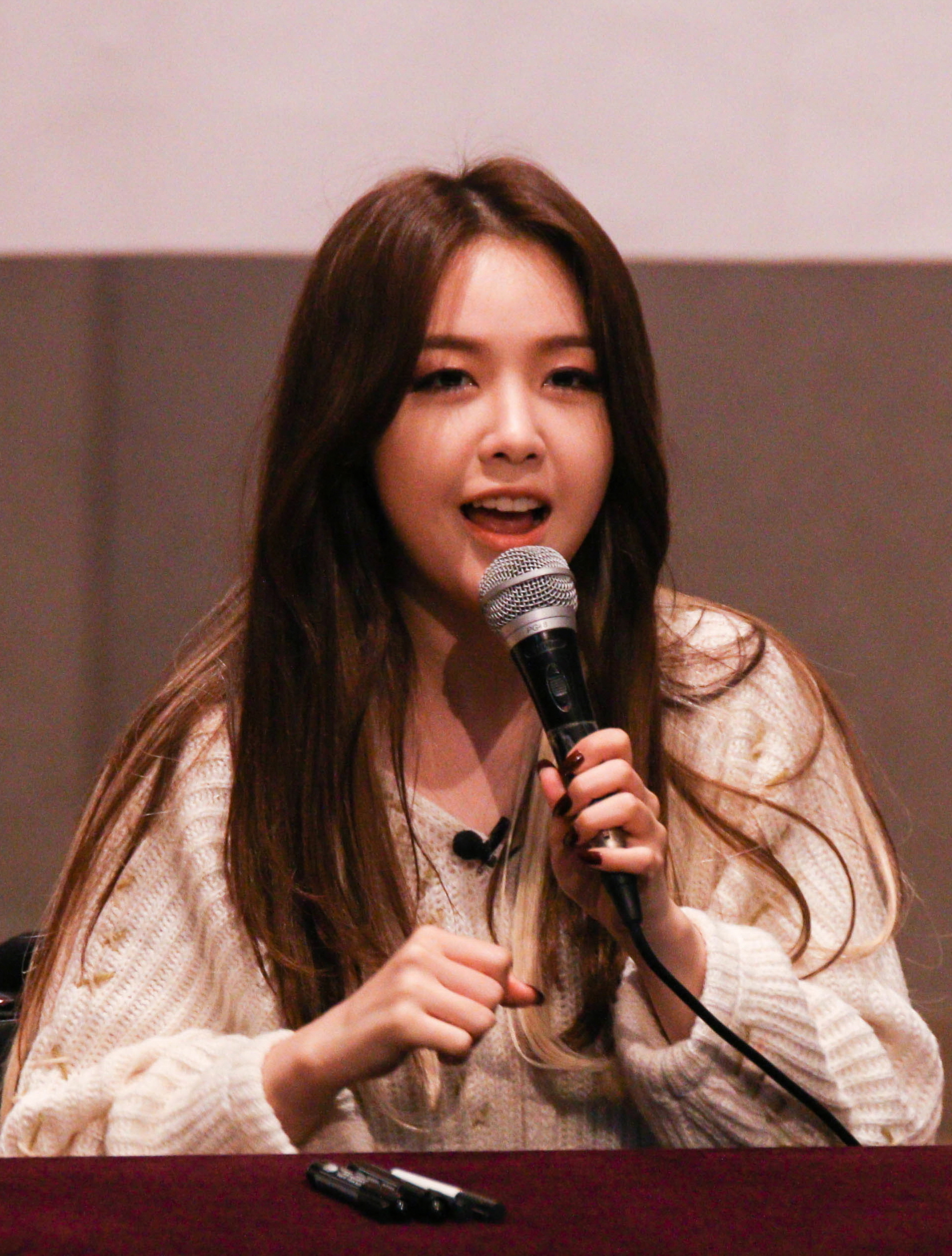 150321 걸스데이 민아 목동 팬사인회